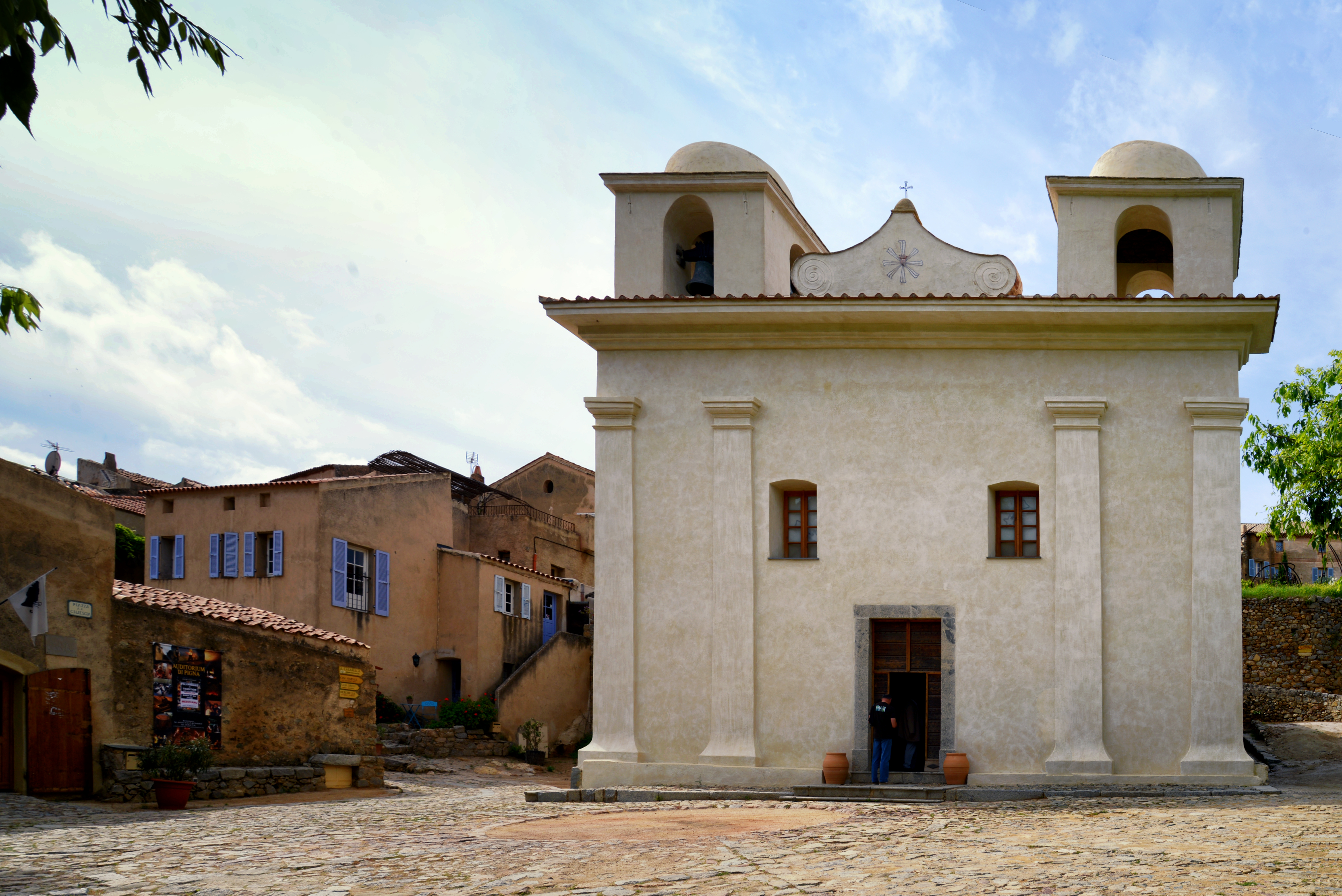 Pigna, Balagne (Corse) - L'église paroissiale de l'Immaculée Conception au centre du village